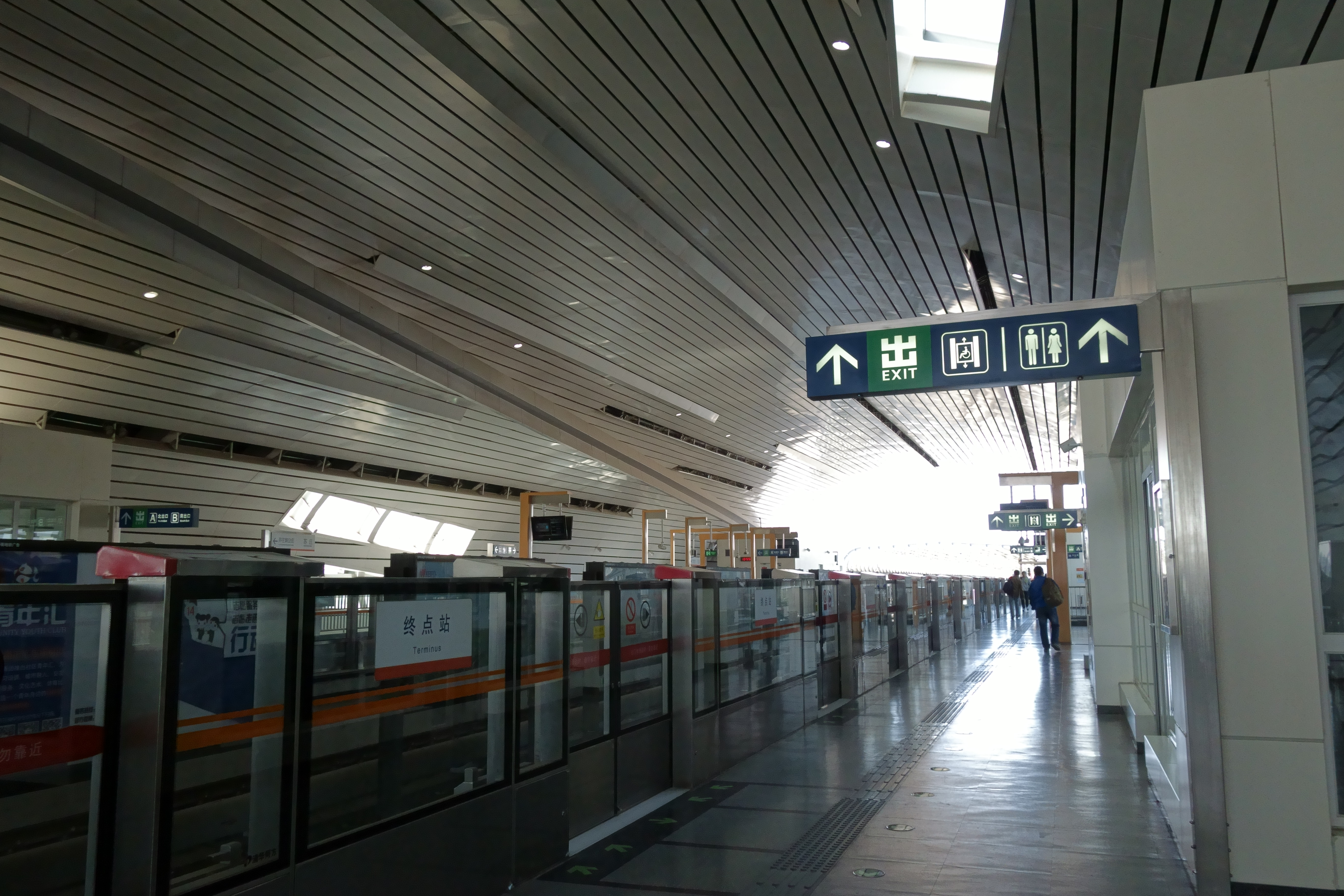 苏庄站下行站台